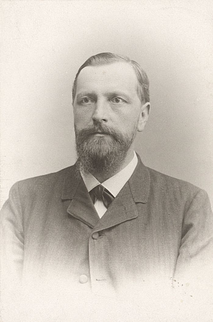 Foto von Adolf Bonhoeffer